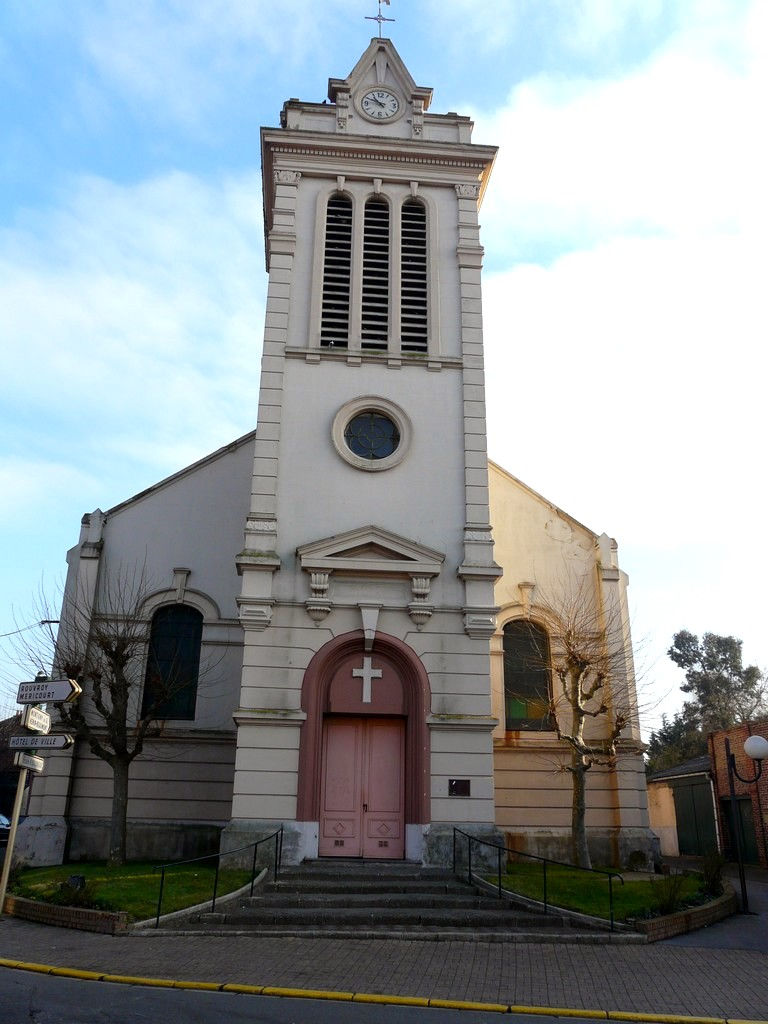 Eglise de Billy Montigny